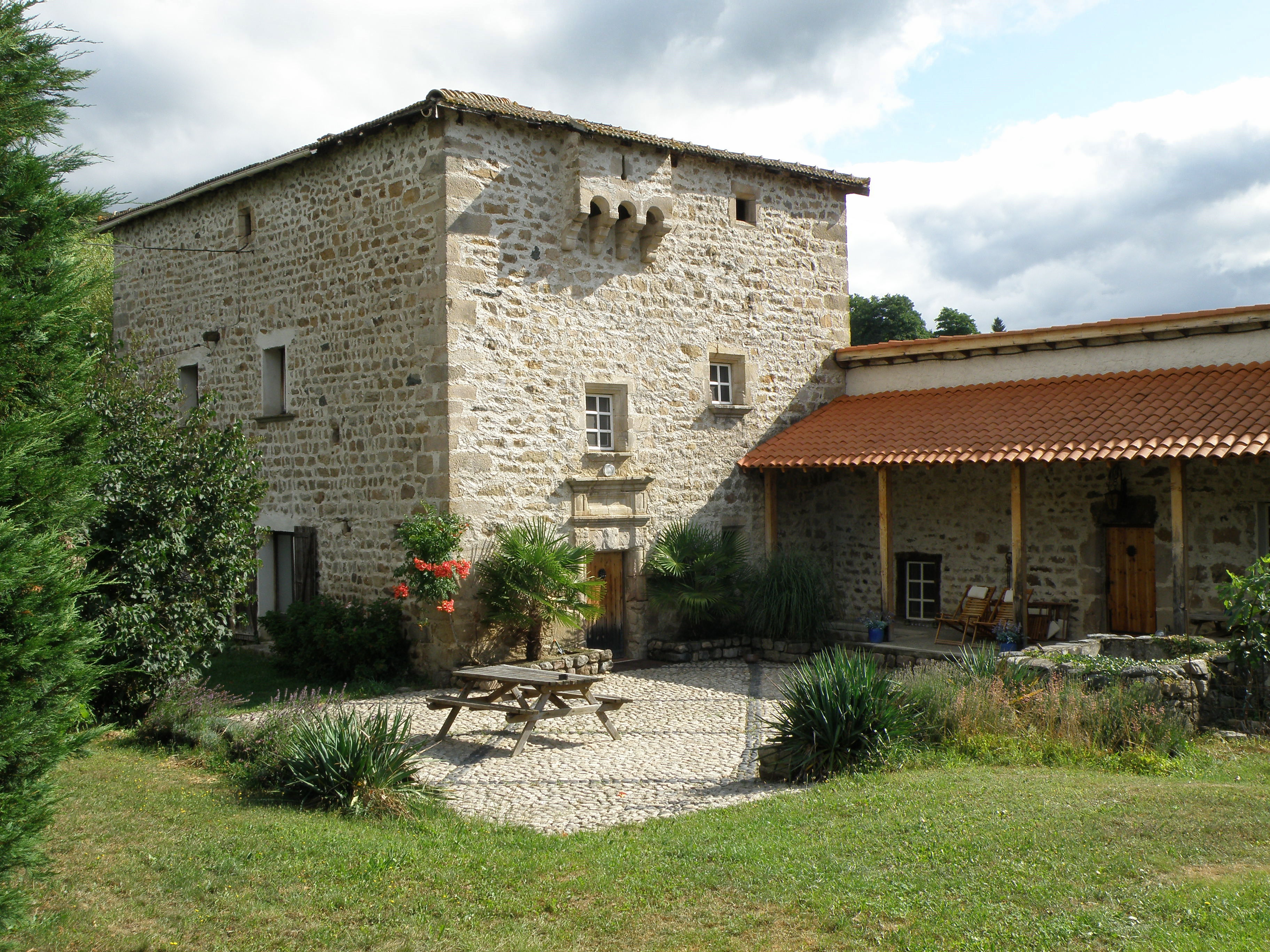 Retournac, dép. de la Haute-Loire, France (Auvergne). Maison forte (ou maison de guet, XIIe siècle) dans le petit hameau de la Bourange, dans l’est de la commune de Retournac. Encadrement de porte armoriée et bretêche à mâchicoulis et à meurtrière.